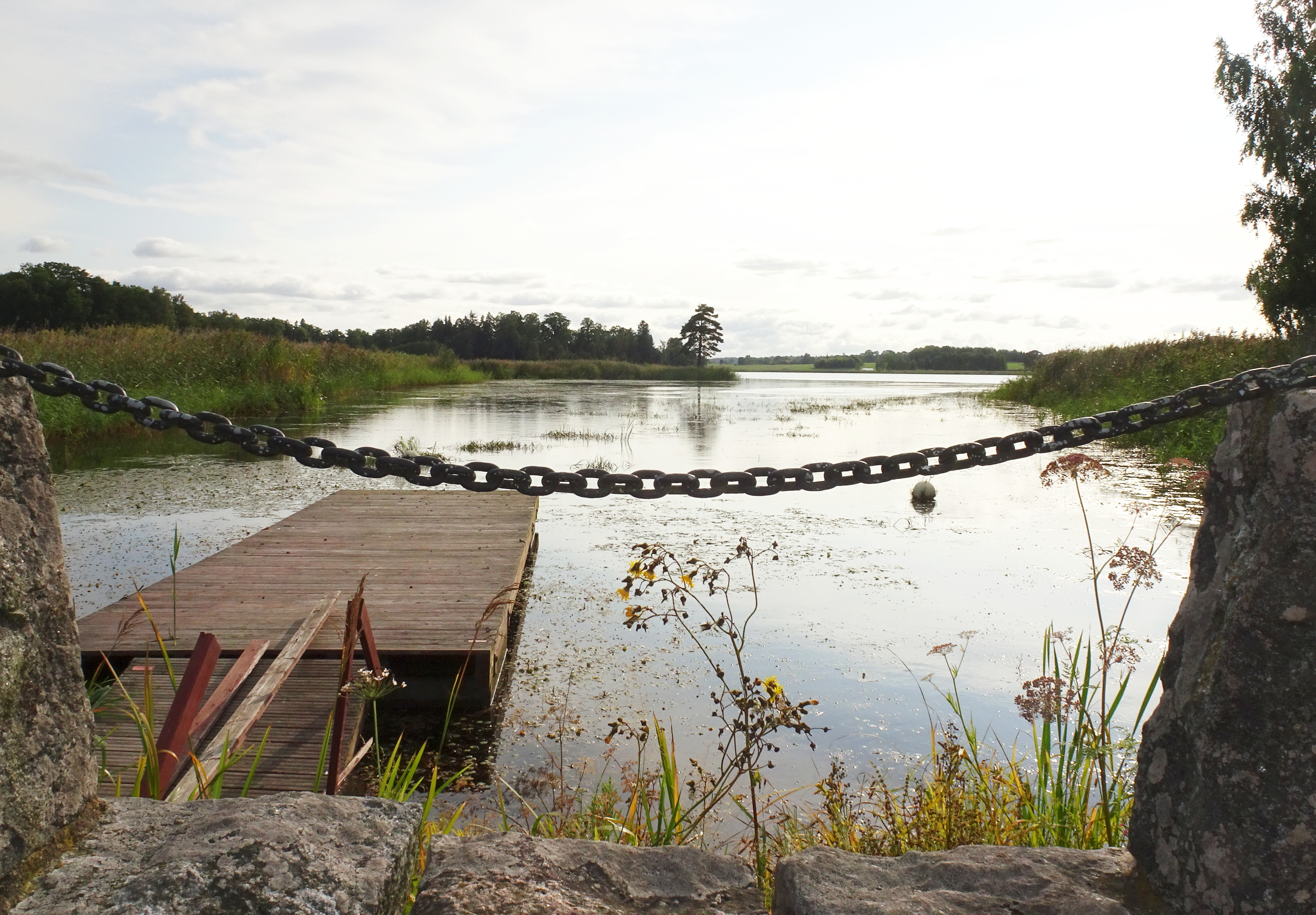 Hedenlundasjön sedd från Hedenlunda bryggan